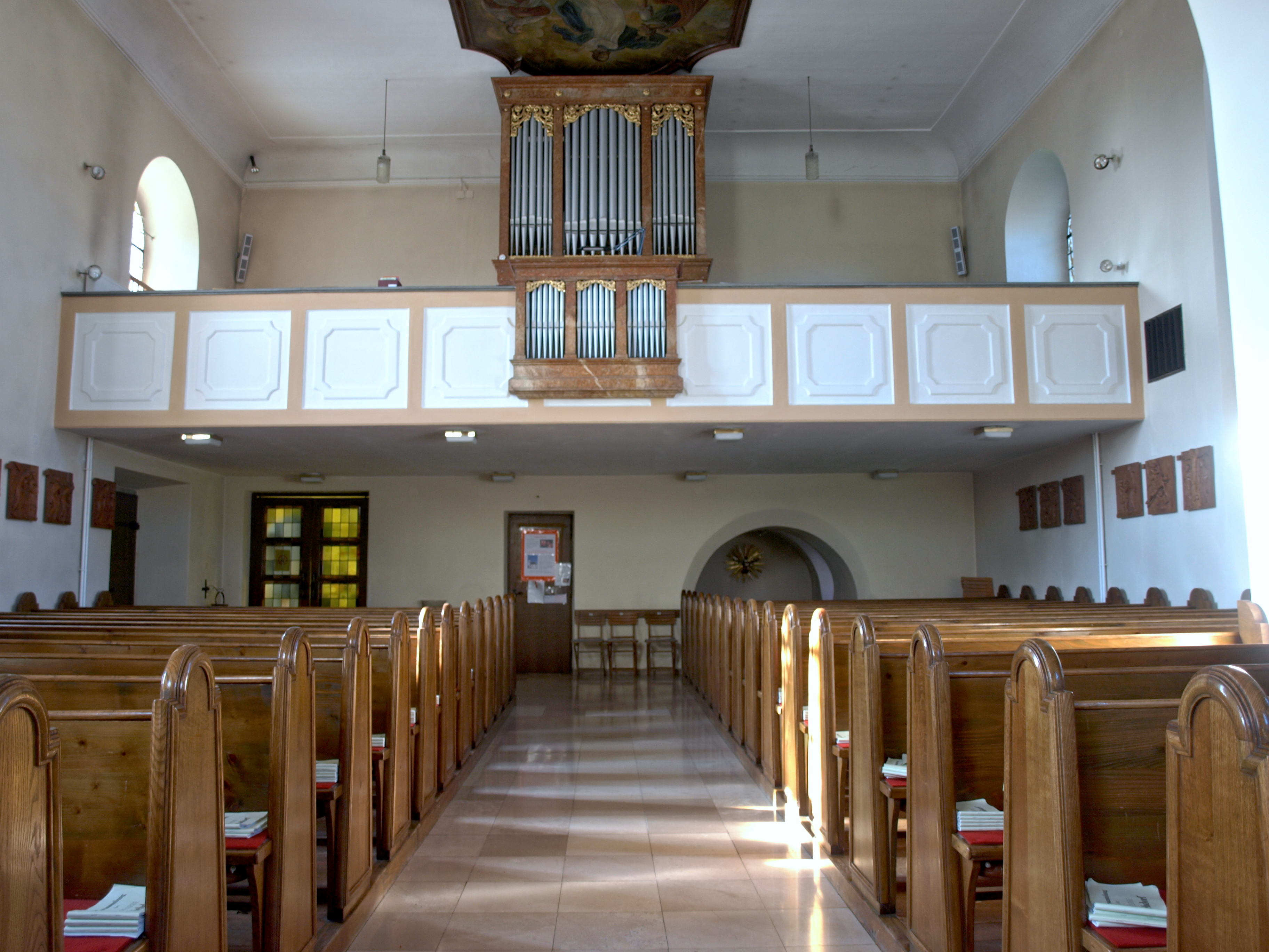 Kath. Pfarrkirche hll. Petrus und Paulus Bilder Orgel bis 2014 Orgelkonzert in Viehdorfseit 2014 neue Orgel von Orgelbau Kögler